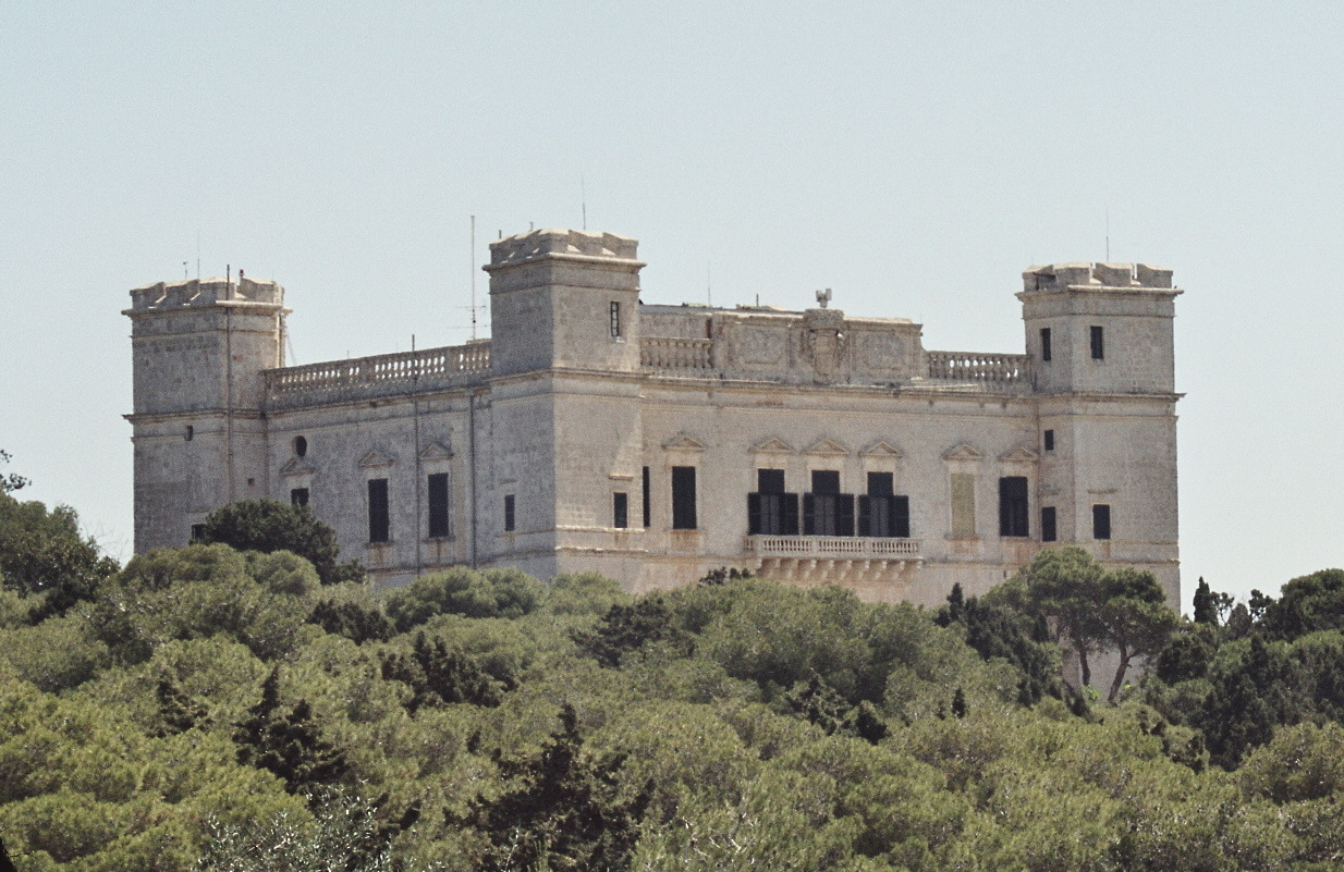 The summer residenz Verdala Palace in Buskett (Malta)